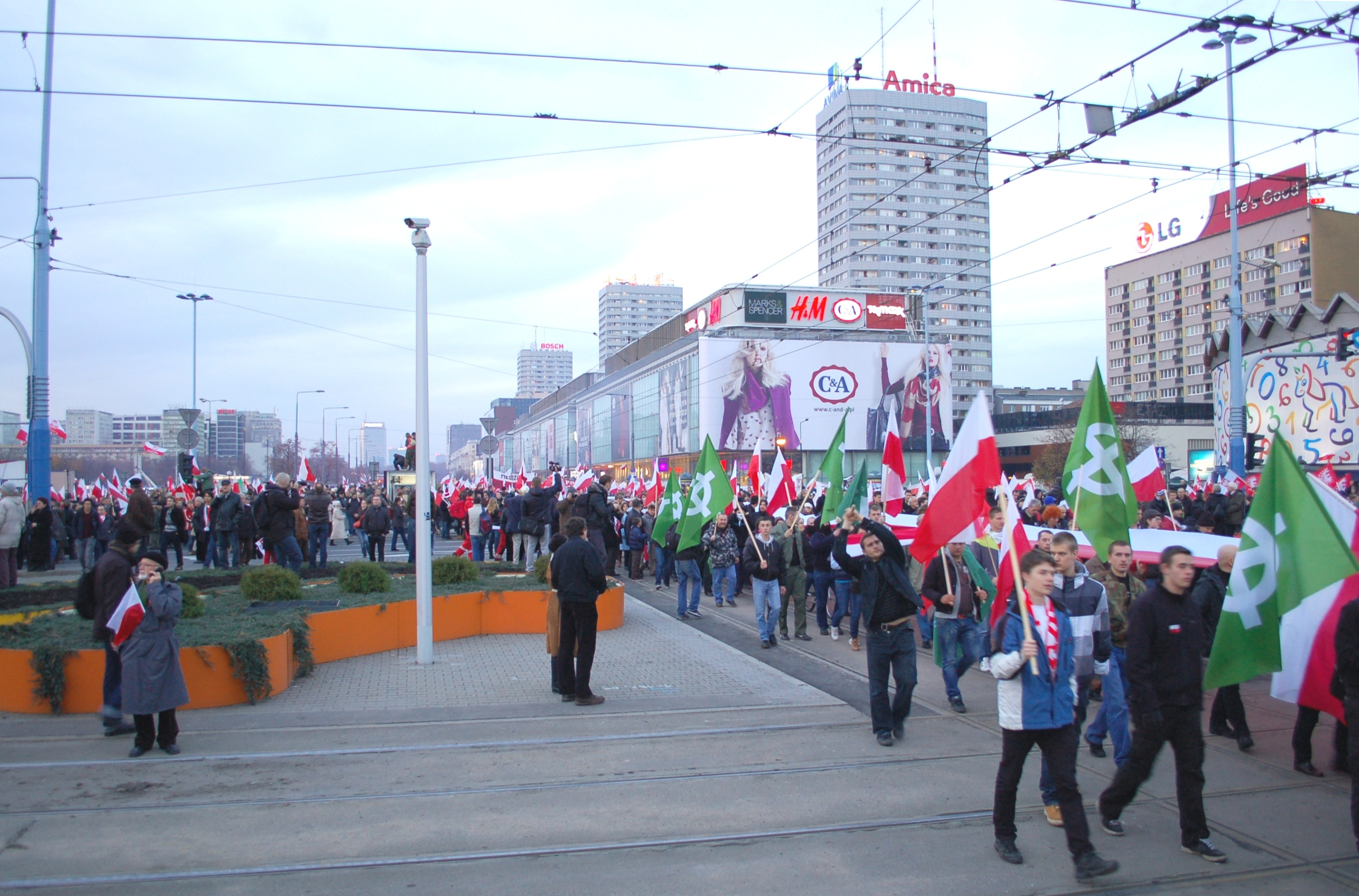 Independence March Warsaw 11.11.2012